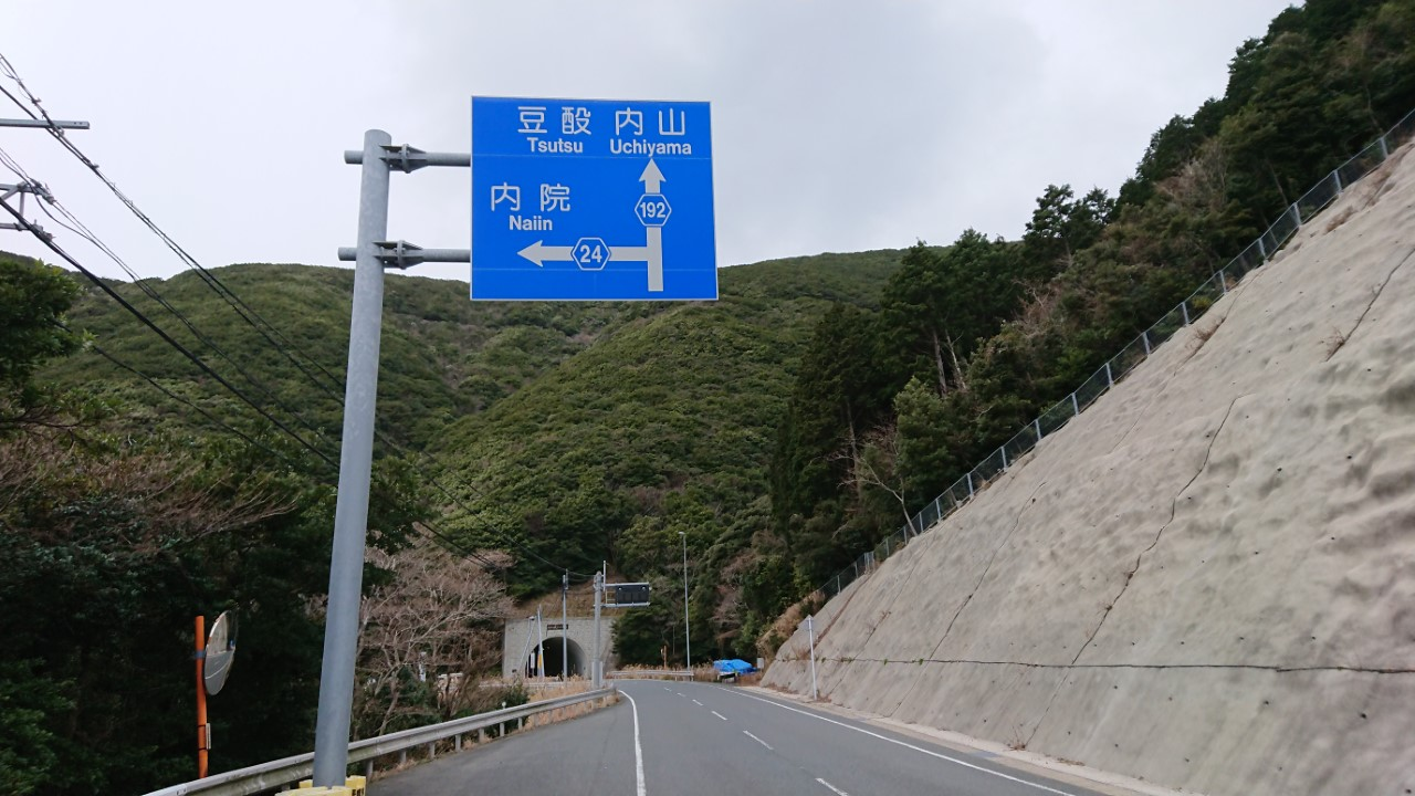 長崎県道192号瀬浦厳原港線 起点（安神）